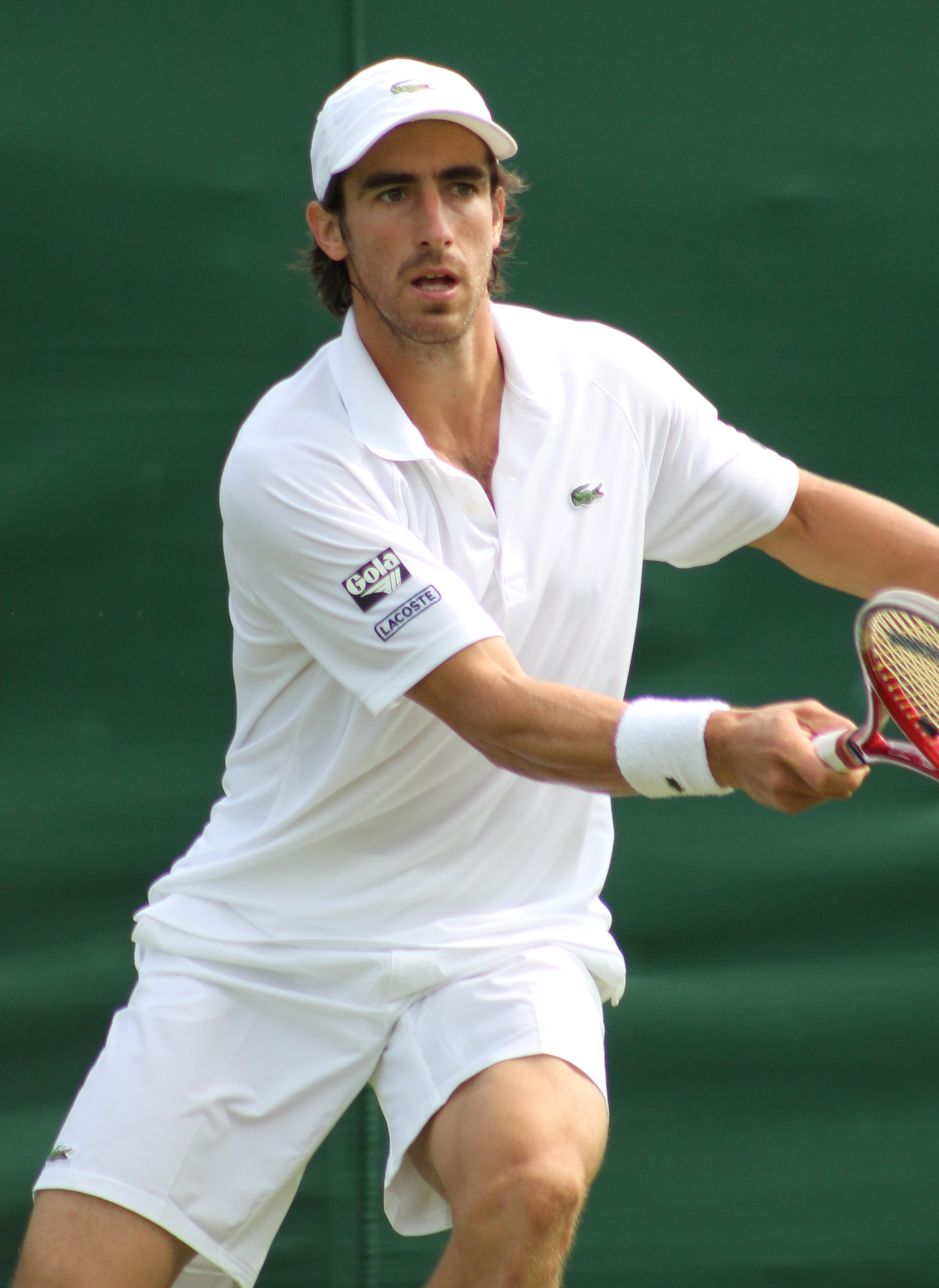 Cuevas WM14 (5)